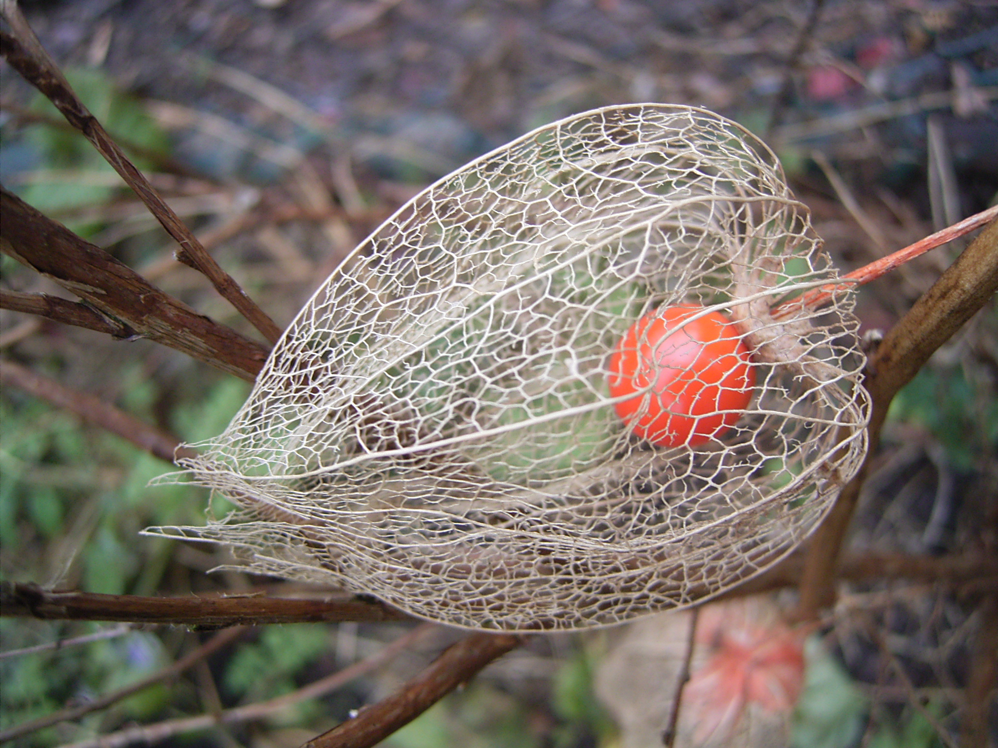 Deze foto toont de vrucht van Physalis Alkekengi. Ik nam de foto op 4 februari 2006 in onze tuin. Fruit of Physalis Alkekengi. I took this picture On Feb 4, 2006 in our garden.